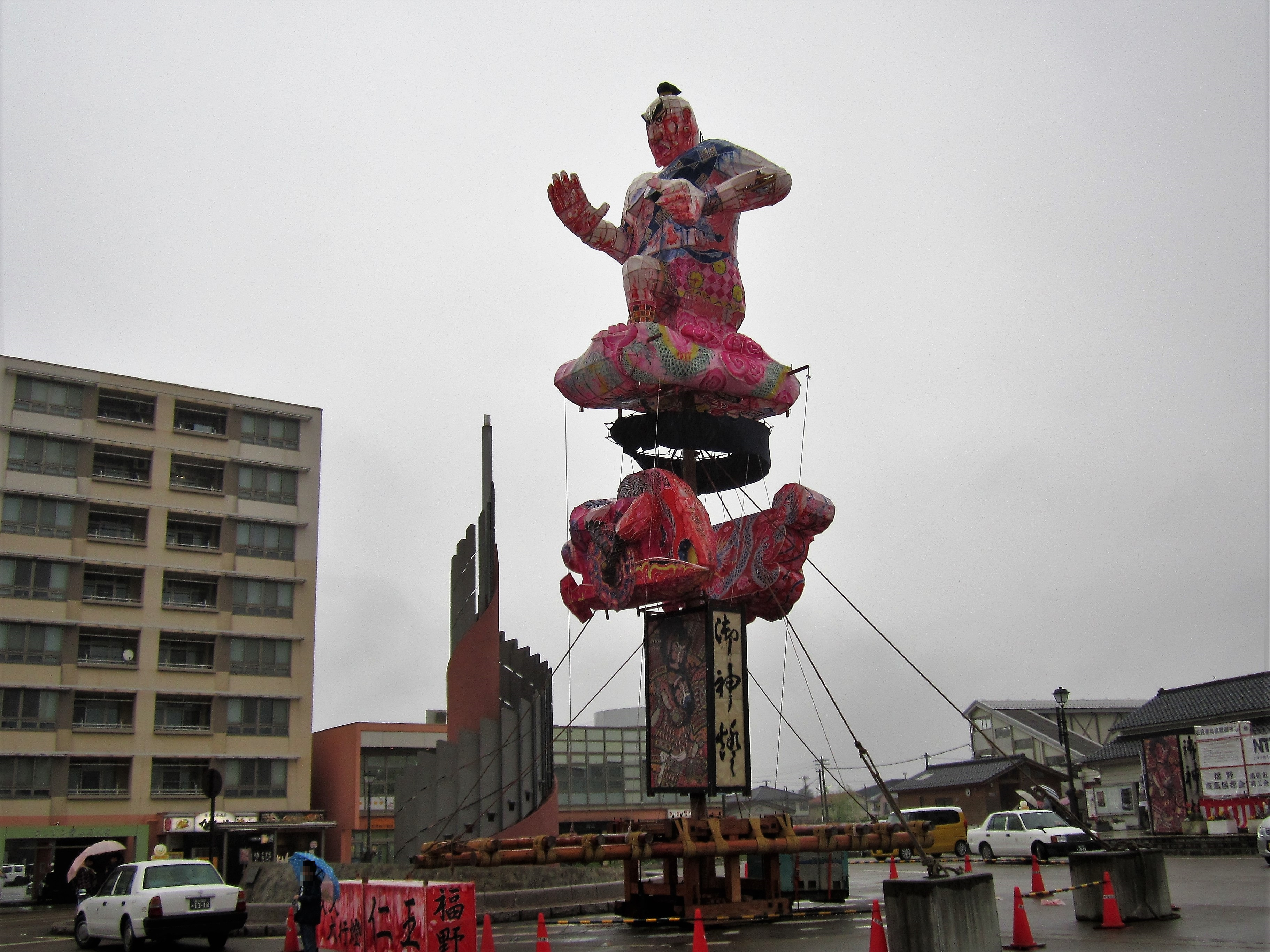 文久の大行燈（福野夜高祭） Canon PowerShot A2200